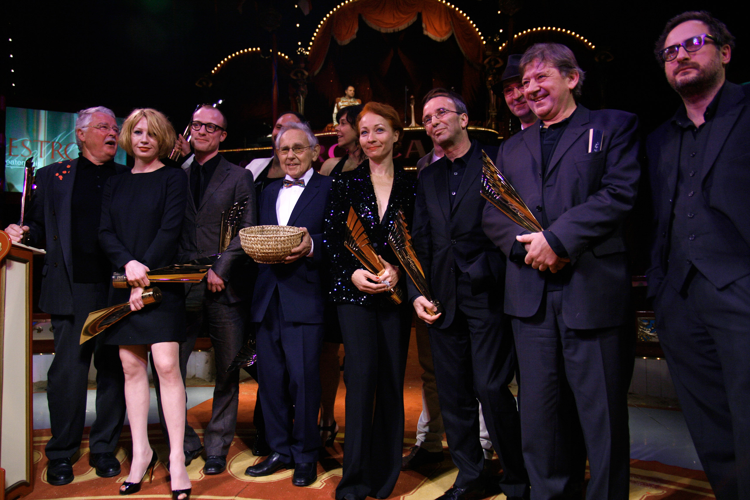 Preisträger des Nestroy-Theaterpreises 2009 (Circus Roncalli auf dem Wiener Rathausplatz).